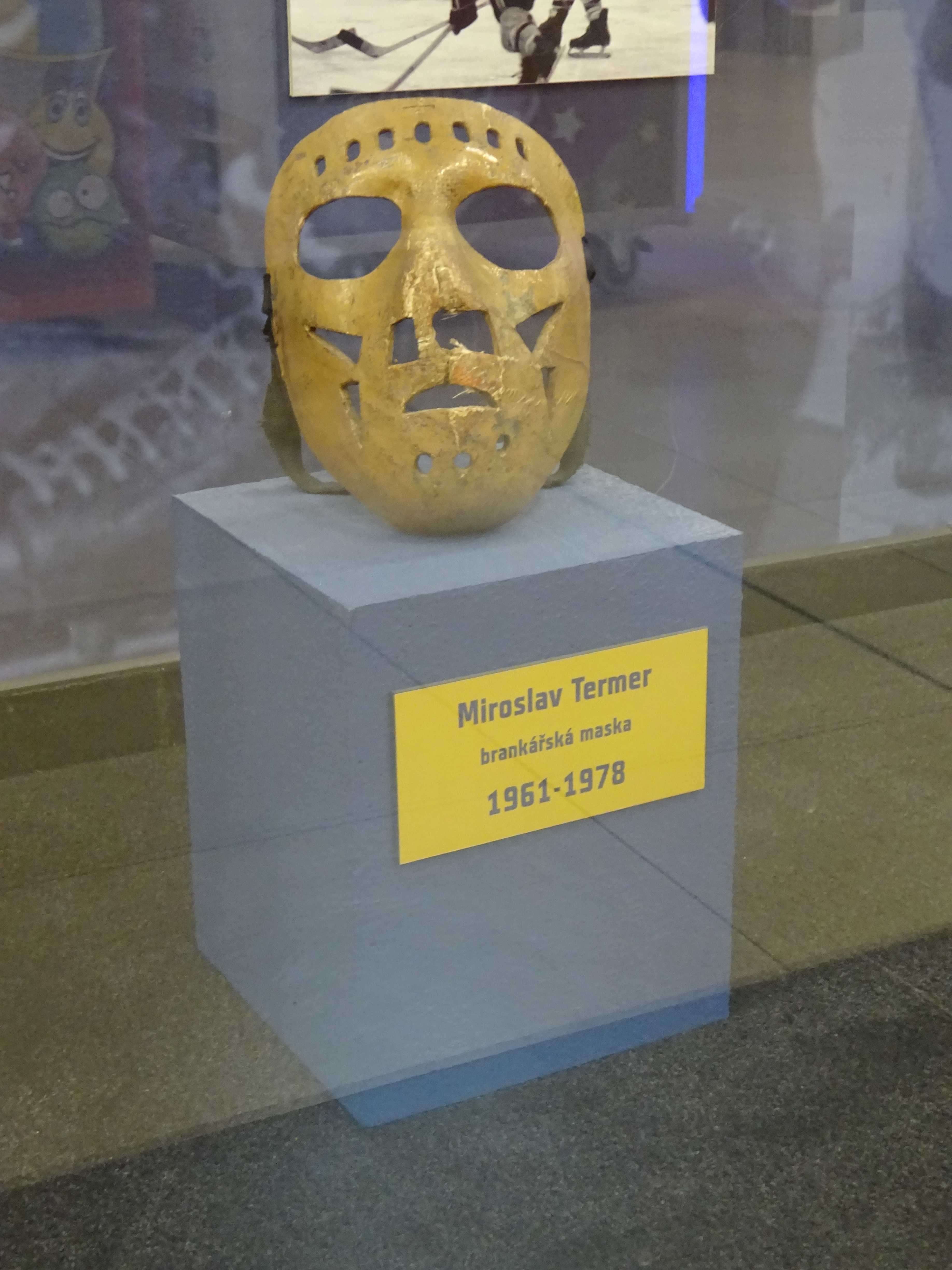 Kladno, OC Oáza, vitrína Síně slávy, brankářská maska (1961-1978) Miroslava Termera (* 1943)